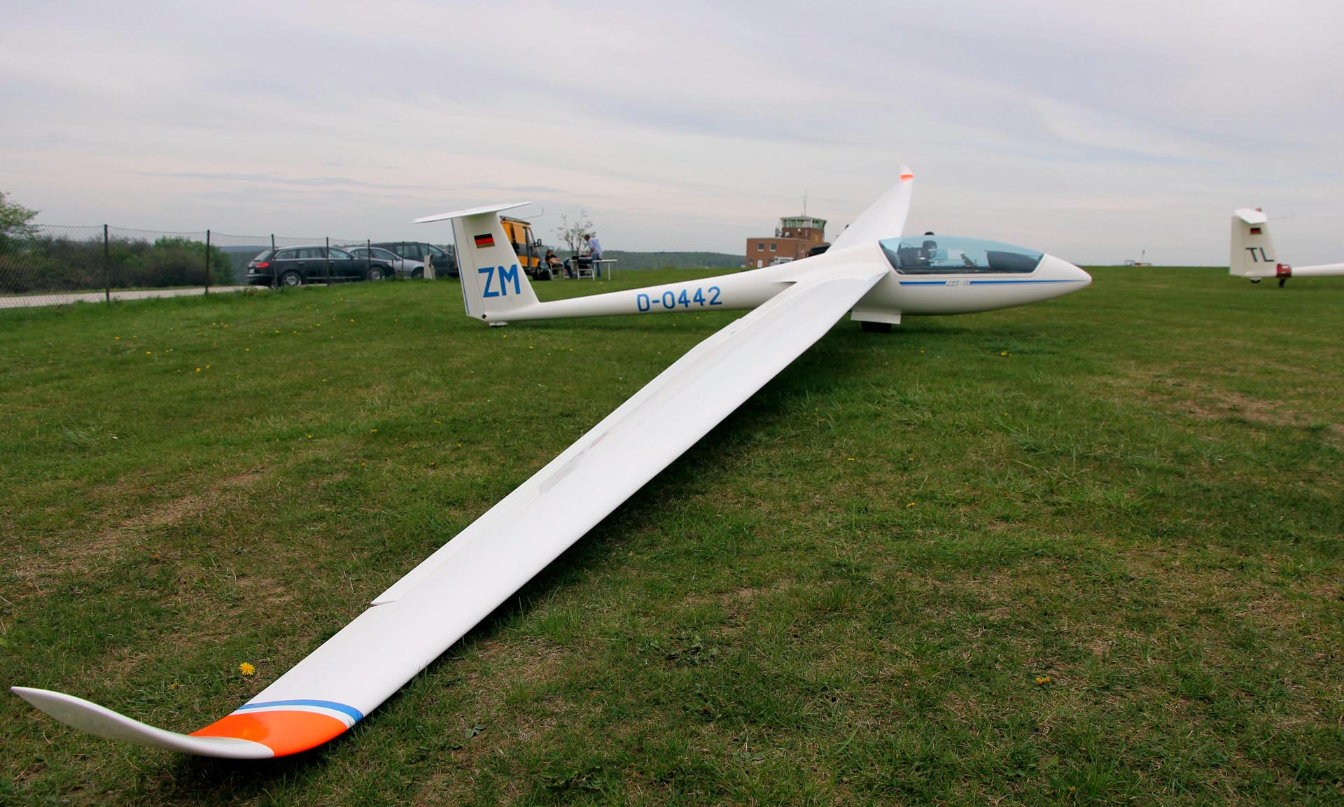 LS8-18 / D-0442 / Stationiert Luftsportverein Bad Gandersheim e.V.